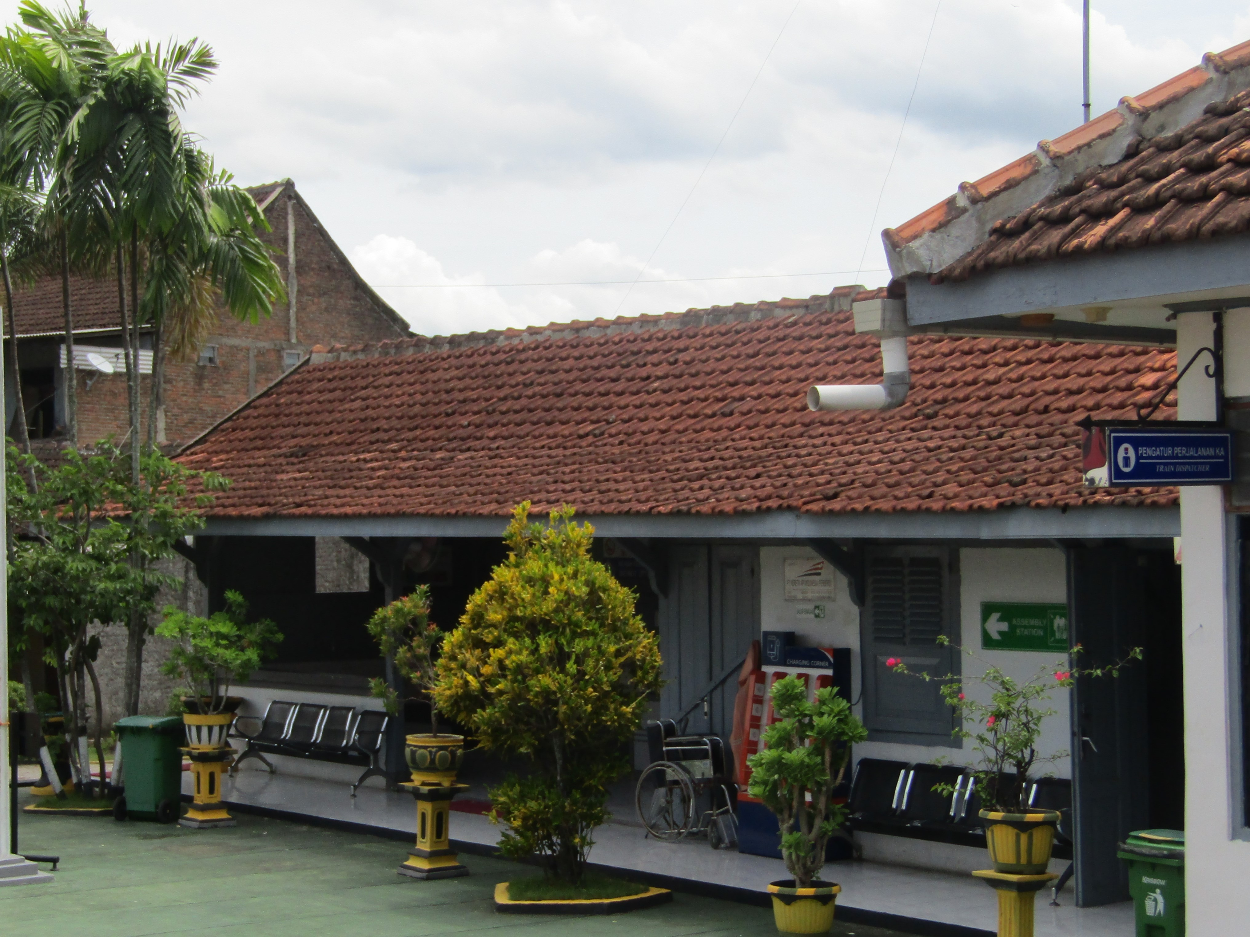 Stasiun Pasarnguter, 2020